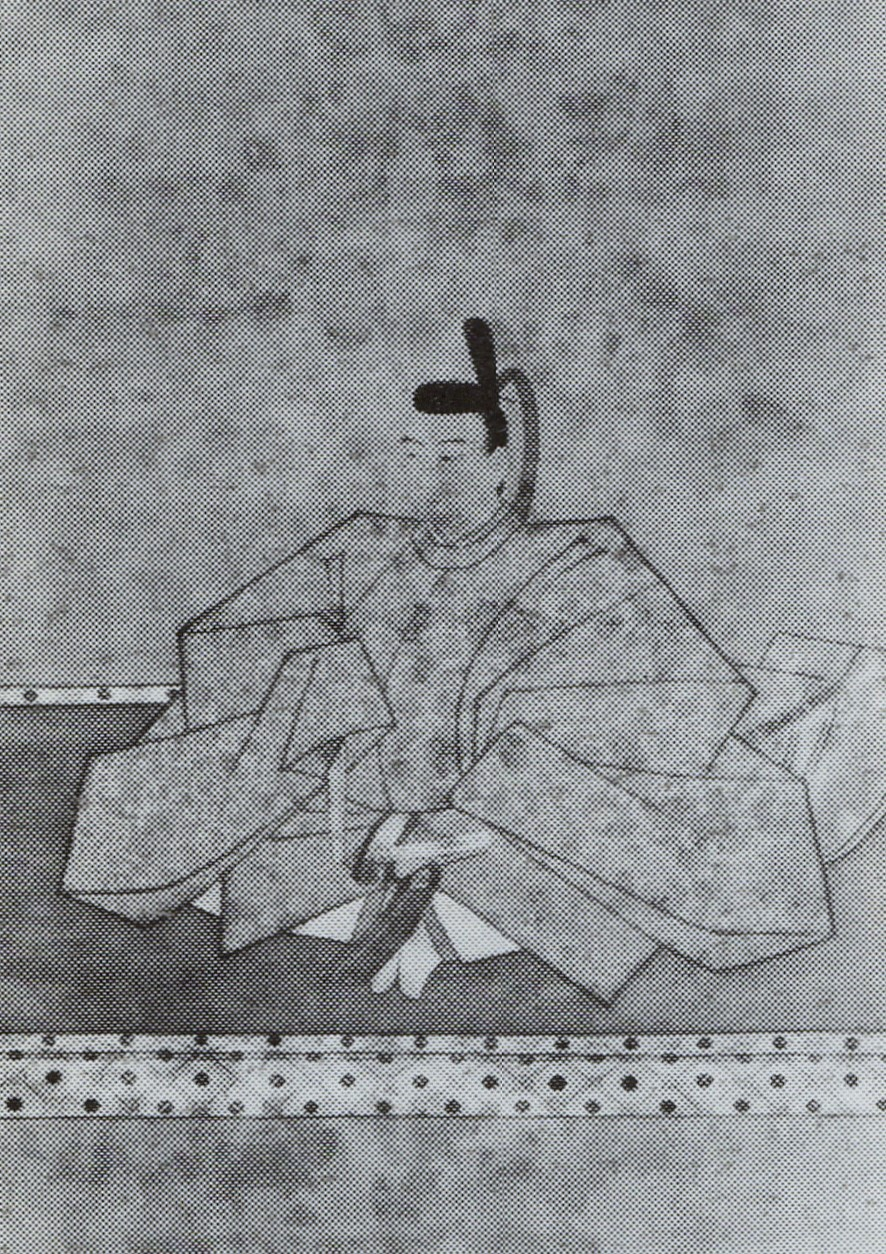 相良長興の肖像(モノクロ)。